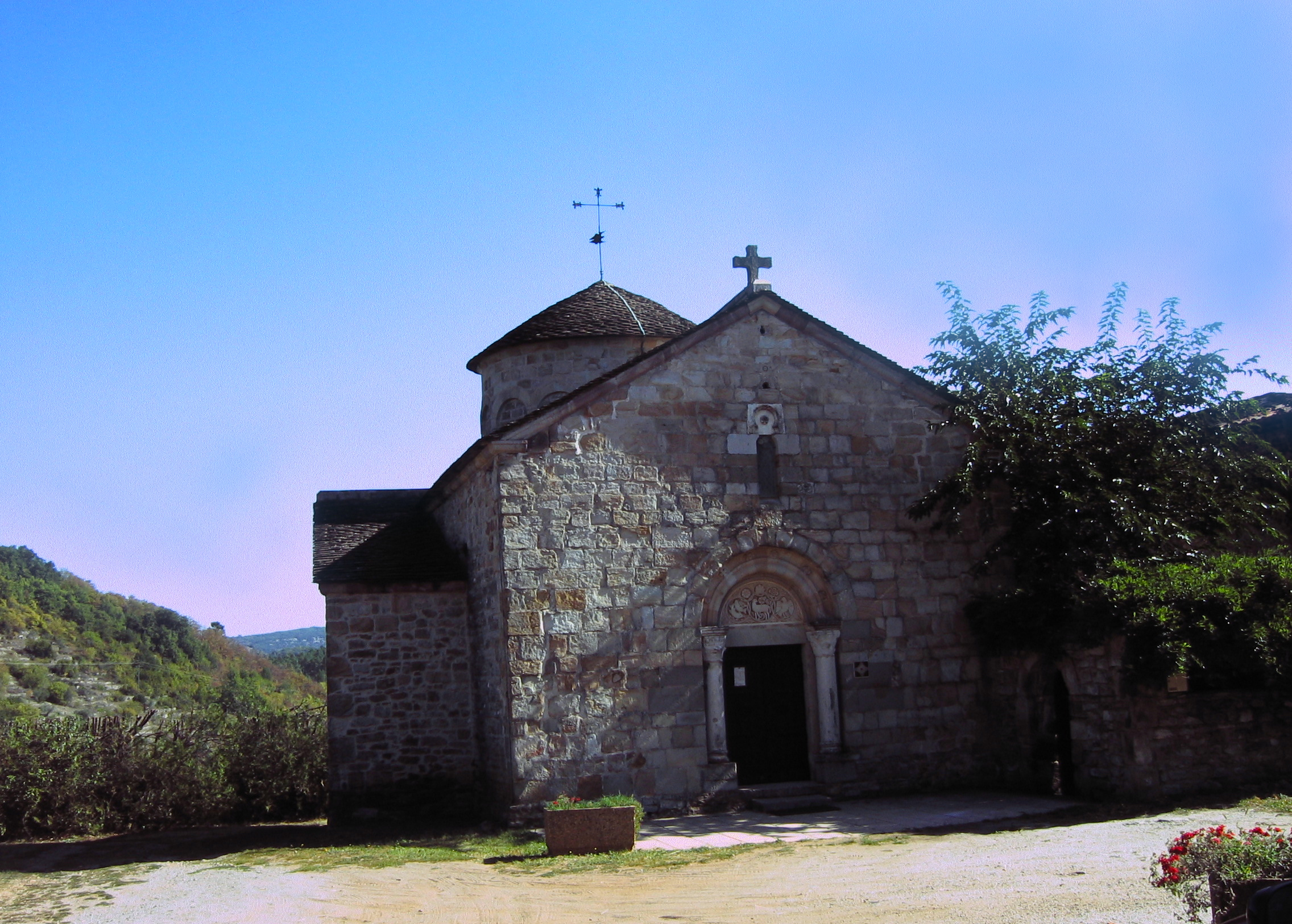 Eglise Romane de Meyrannes dans le Gard.